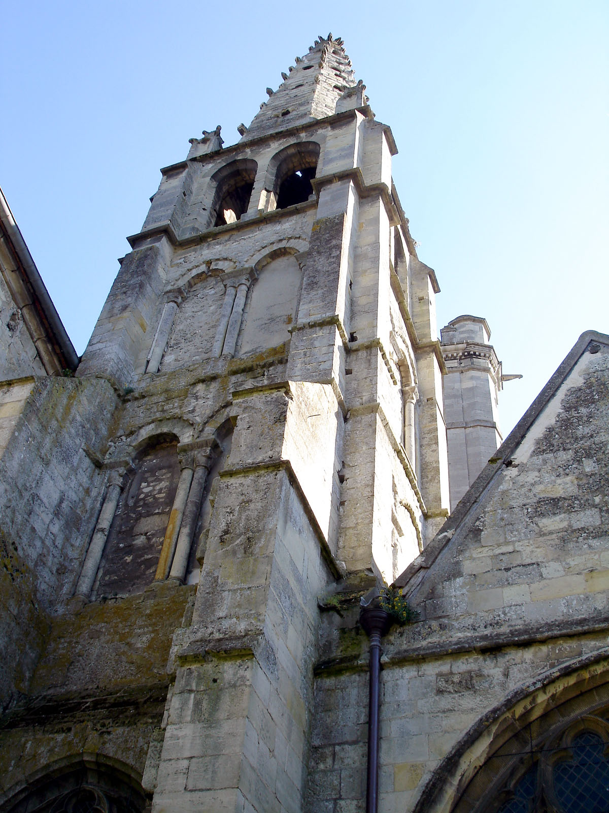 Tour romane de l'église Saint-Pierre à Senlis, Oise, France.